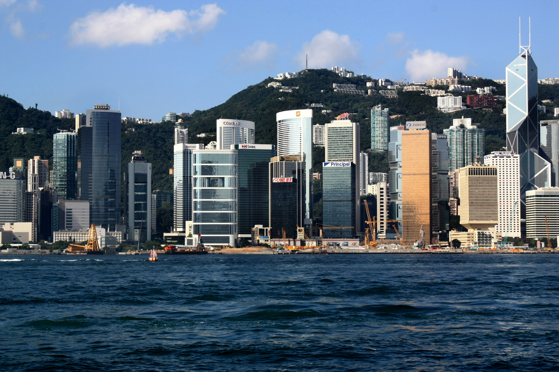 Buildings in Admirity, Hong Kong 金鐘